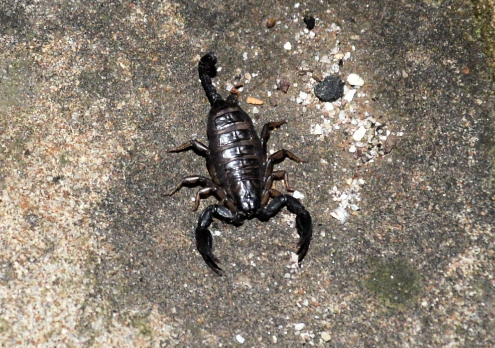 Euscorpius germanus, Sichtung in Südtirol